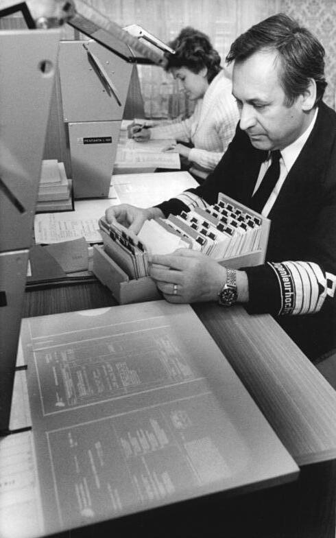 Rostock, Patentbibliothek ADN-ZB Sindermann 14.3.86 Rostock:Patentbibliothek-Mit dem Wissen aus internationalen Patentschriften können sich Wissenschaftler und Ingenieure, Techniker und Studenten aus den Nordbezirken der Republik seit dem vergangenen Jahr auch in Rostock vertraut machen. An der Wilhelm-Pieck-Universität wurde dafür eine polytechnische Patentbibliothek eingerichtet, in der detaillierte Informationen über Neuerungen aus aller Welt sowohl in Originalschriften auf Mikroplenfilm als auch in Referatekarteien rasch zugänglich sind. Reger Betrieb herrsch ständig an den Lesegeräten. Die meisten Nutzer kamen bisher aus Forschungseinrichtungen und Betrieben der Nordbezirke, so Jochen Unger, wissenschaftlicher Assistent an der Ingenieurhochschule für Seefahrt Warnemünde-Wustrow und Heidrun Schröder von der Abteilung Forschung des VEB Düngemittelwerk Rostock.